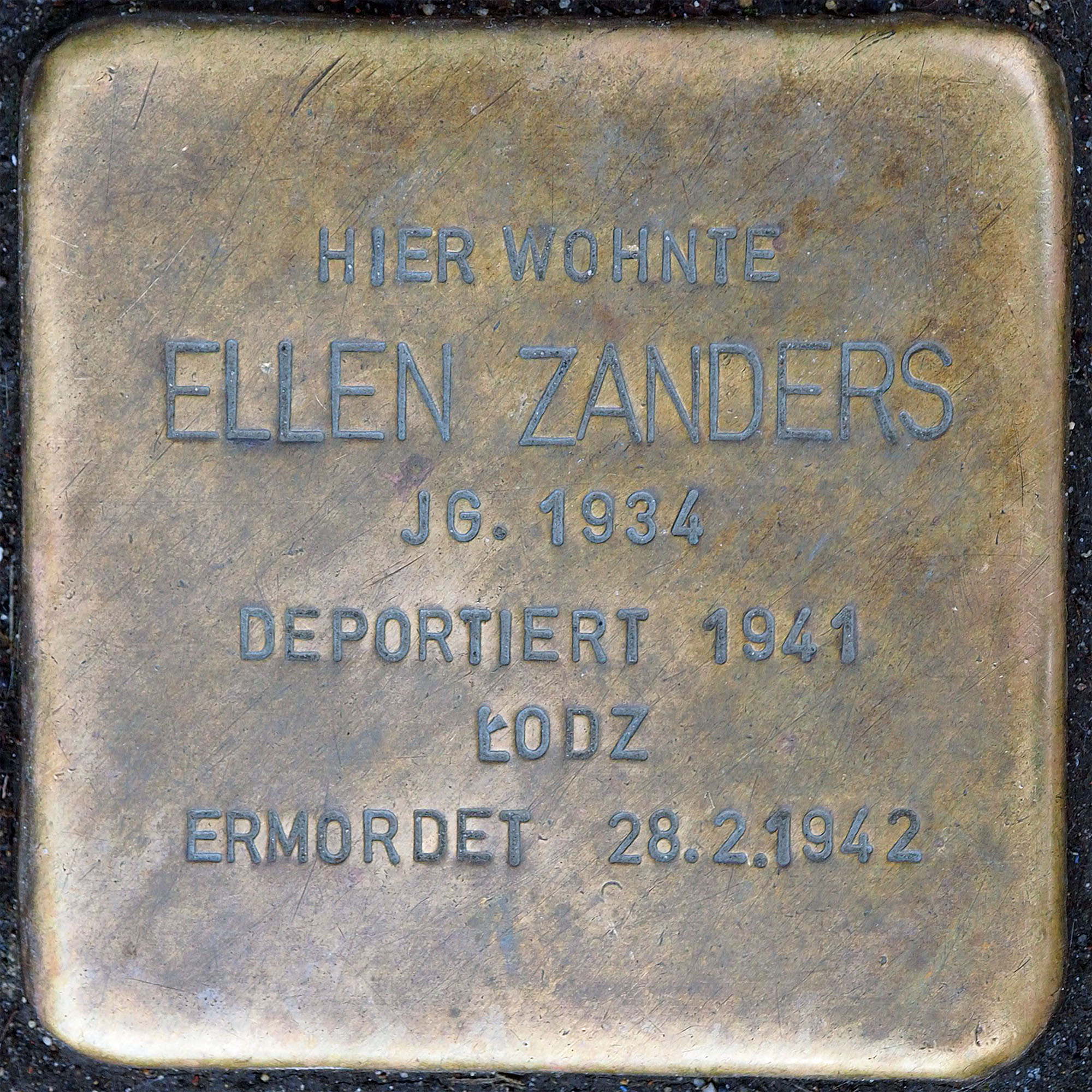 Stolpersteine MG: Zanders, Ellen